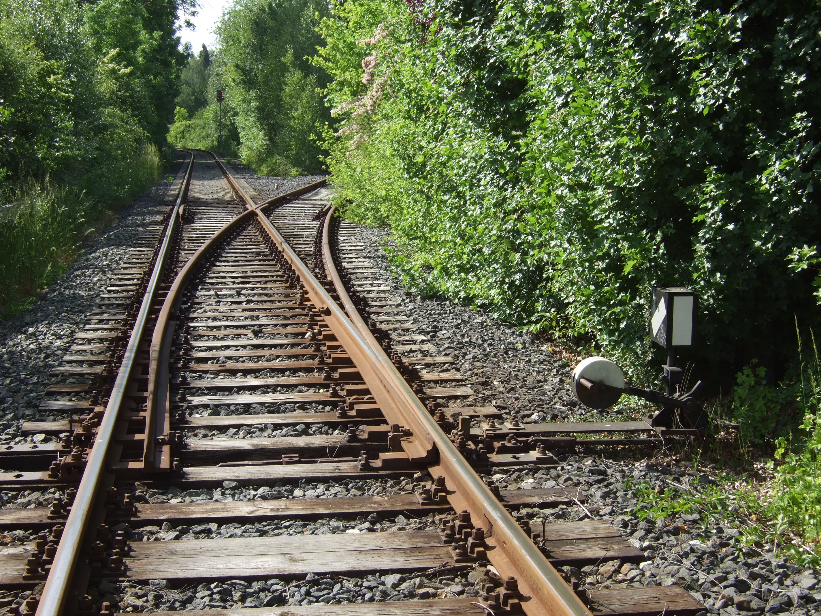 Handweiche Bayreuth Sankt Georgen